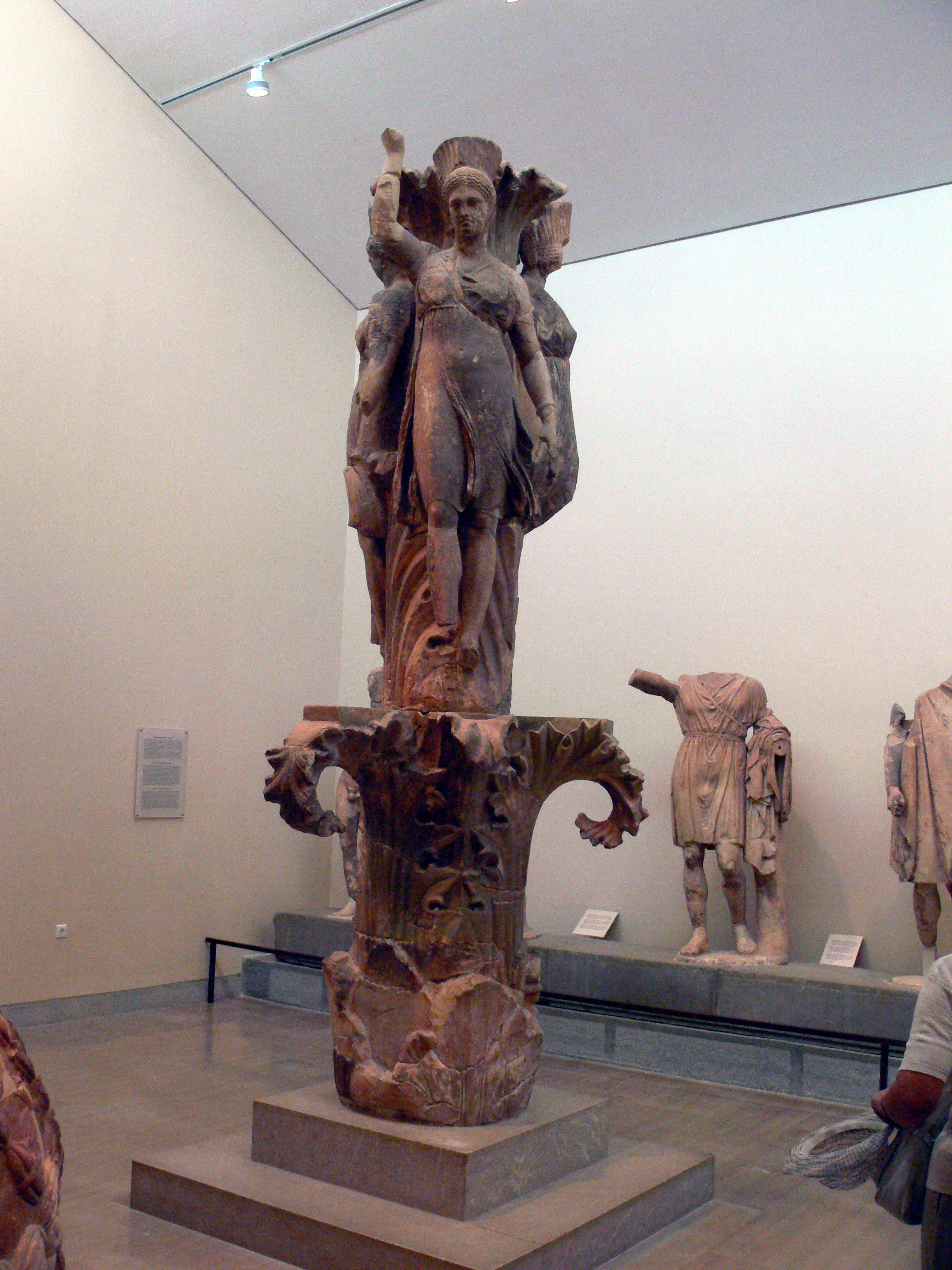 Säule mit Tänzerinnen